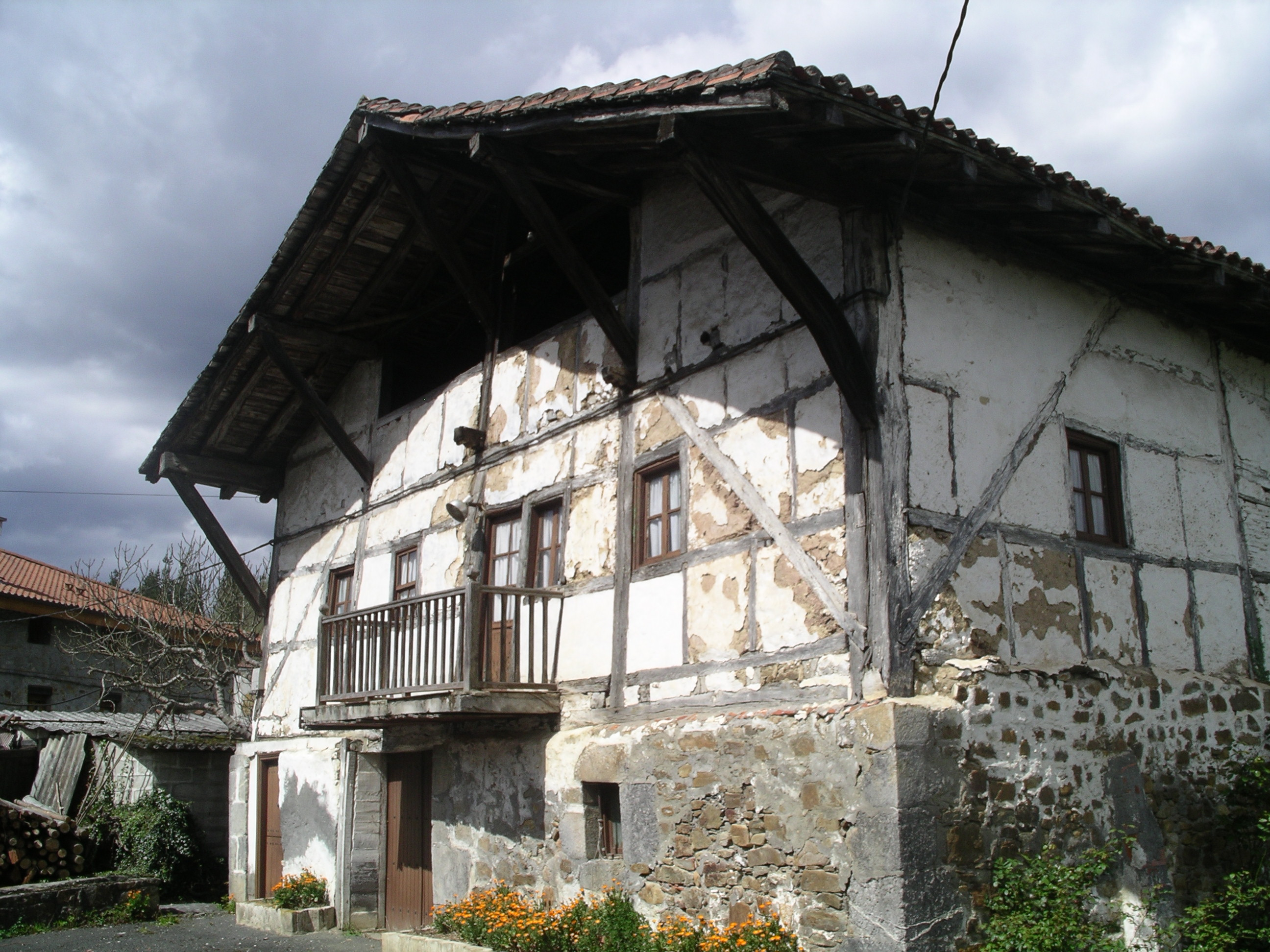 Fachada principal de un caserio del barrio Sautuola de Zeberio, en Bizkaia.